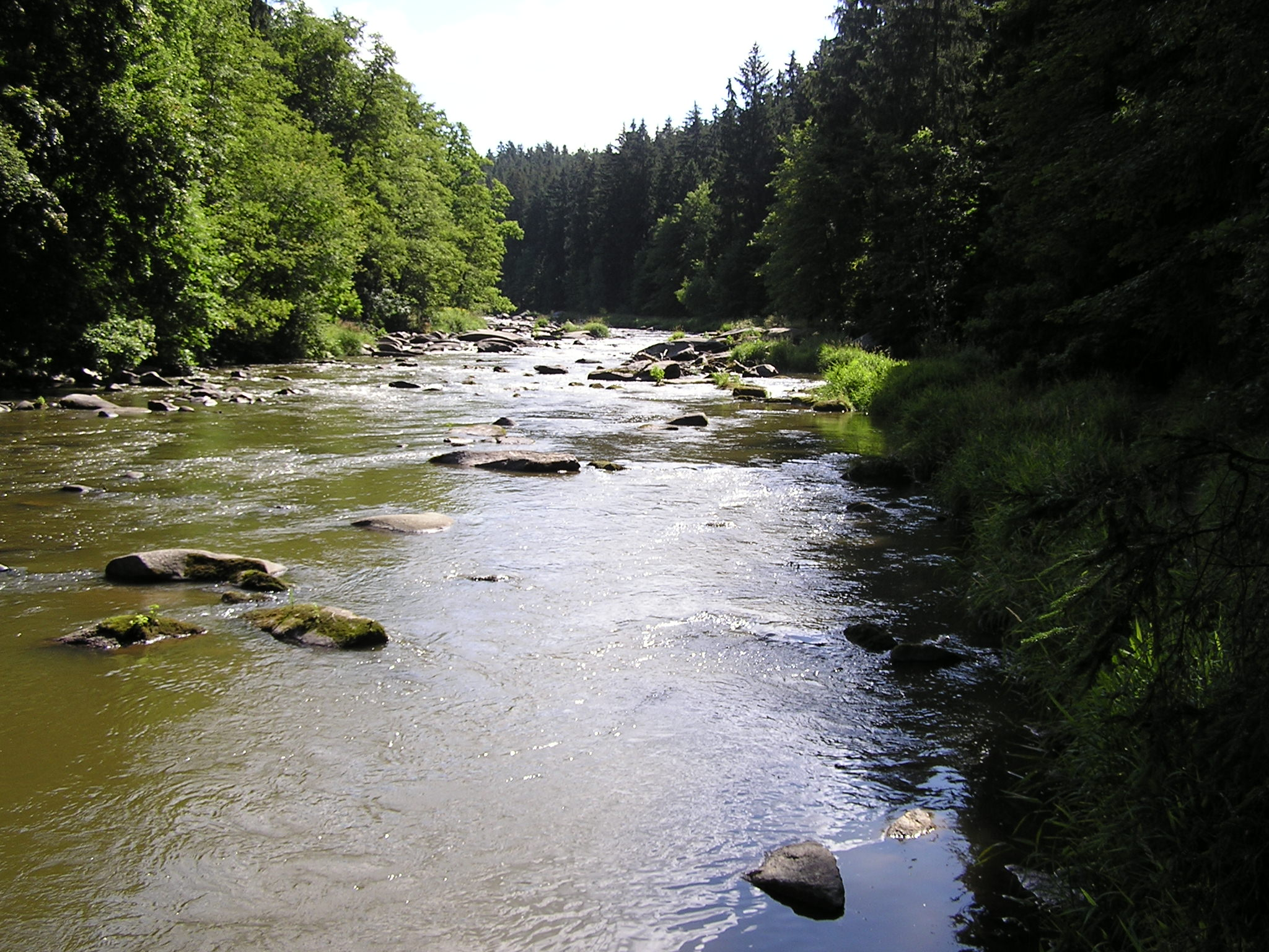 Stvořidla na Sázavě